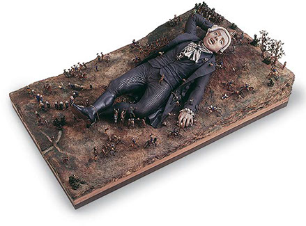 Gulliver in Lilliput (Deutsches Spielzeugmuseum)